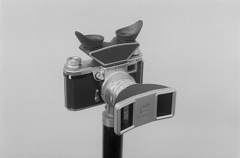 Original image description from the Deutsche Fotothek Kamera "Praktina FX"